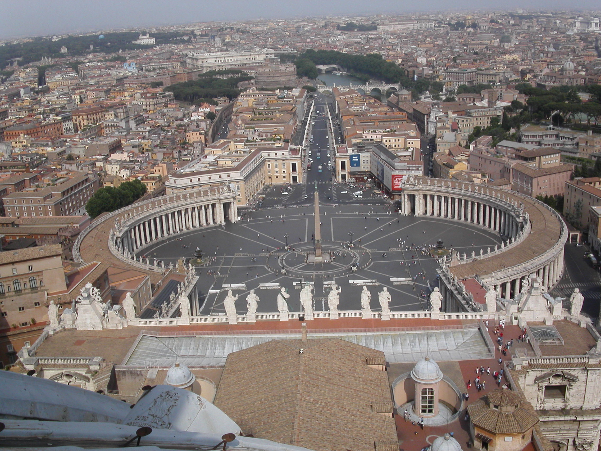 Piazza di San Pietro, seen from the Basilica